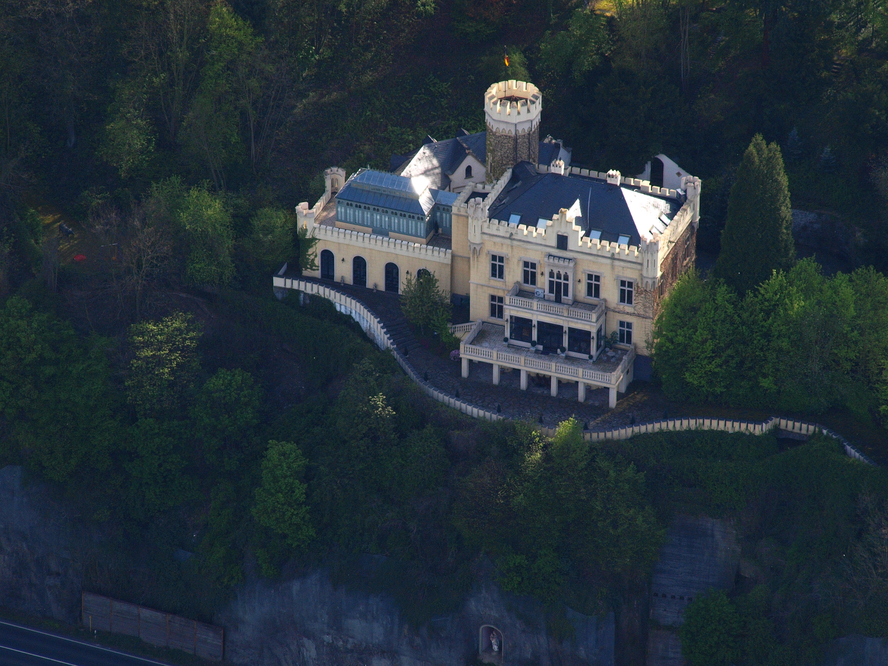 Schloss Marienfels, Remagen: Luftaufnahme